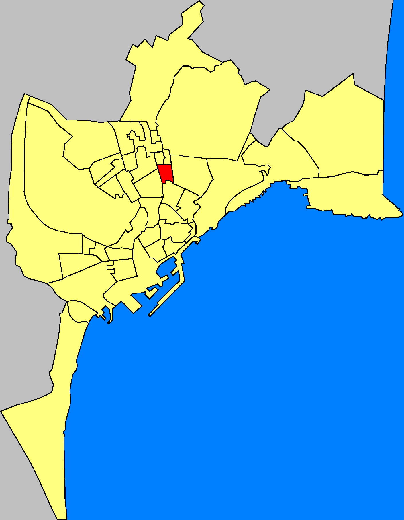 Barrio Sidi Infi-Nou Alacant